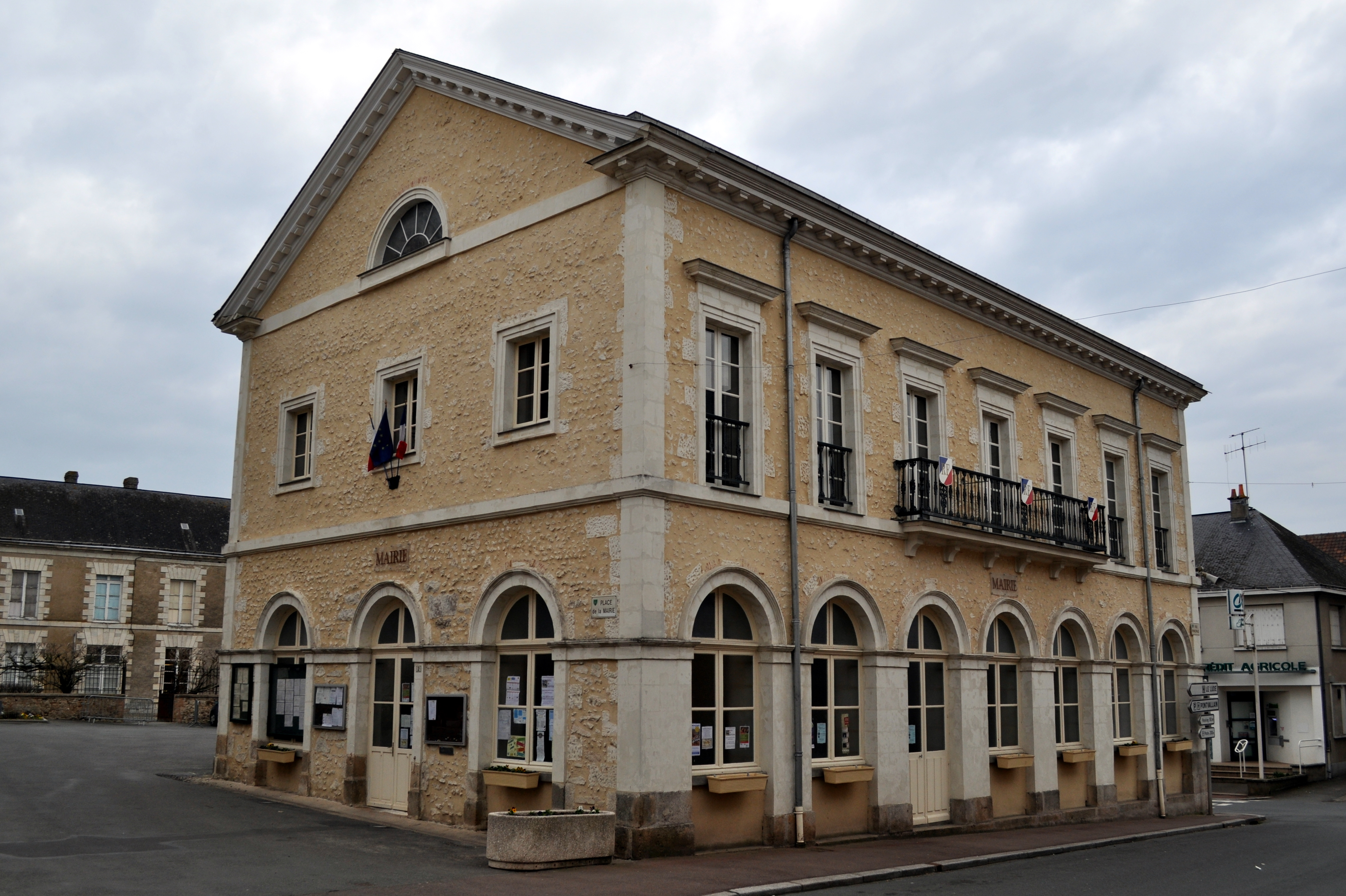 Mairie de Mansigné (Sarthe)